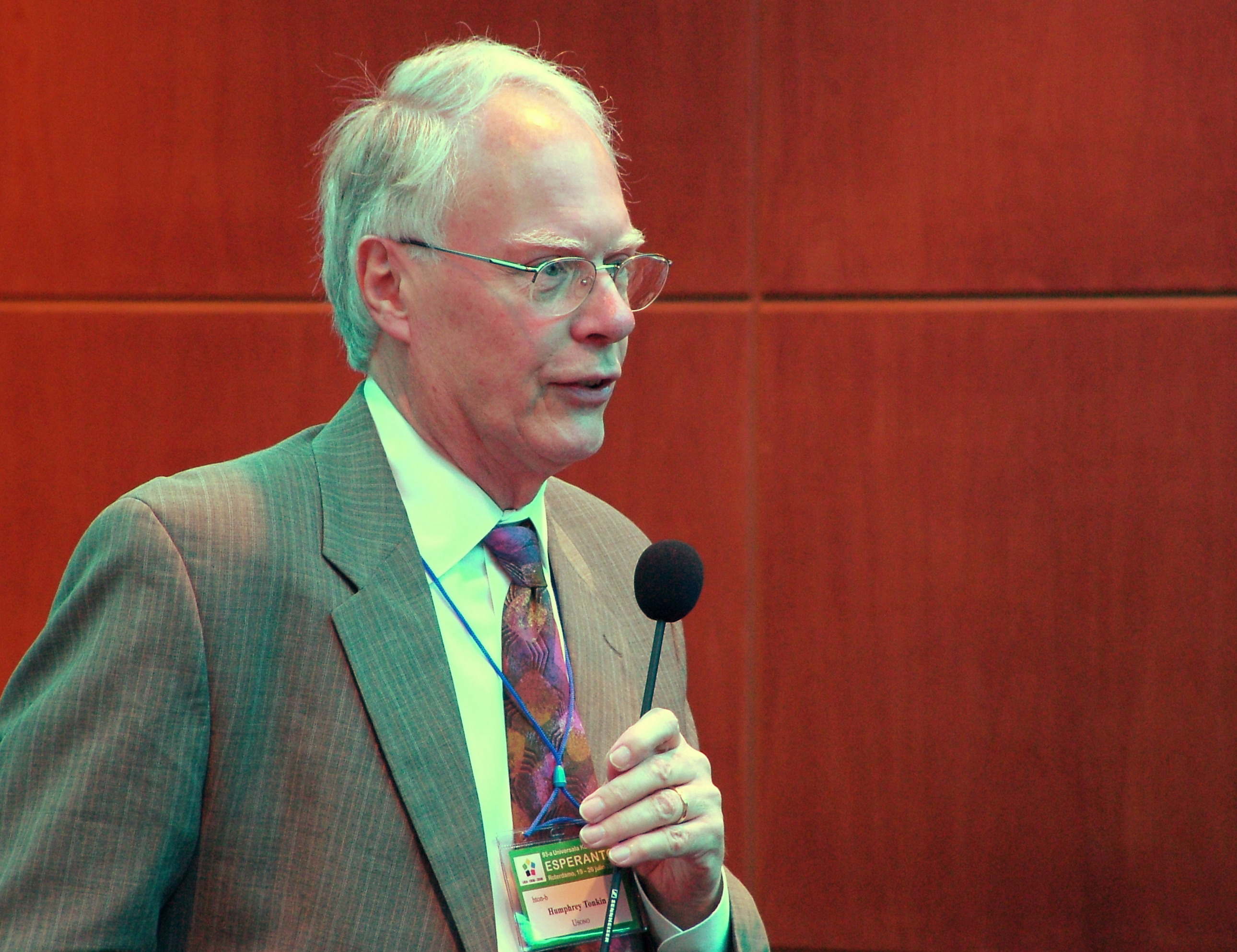 Universala Kongreso de Esperanto, Roterdamo 2008. Humphrey Tonkin en la Kleriga Lundo: Argumentado.